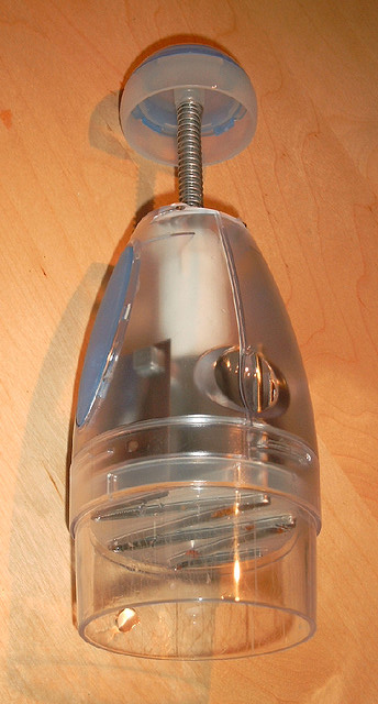 vegetable chopper